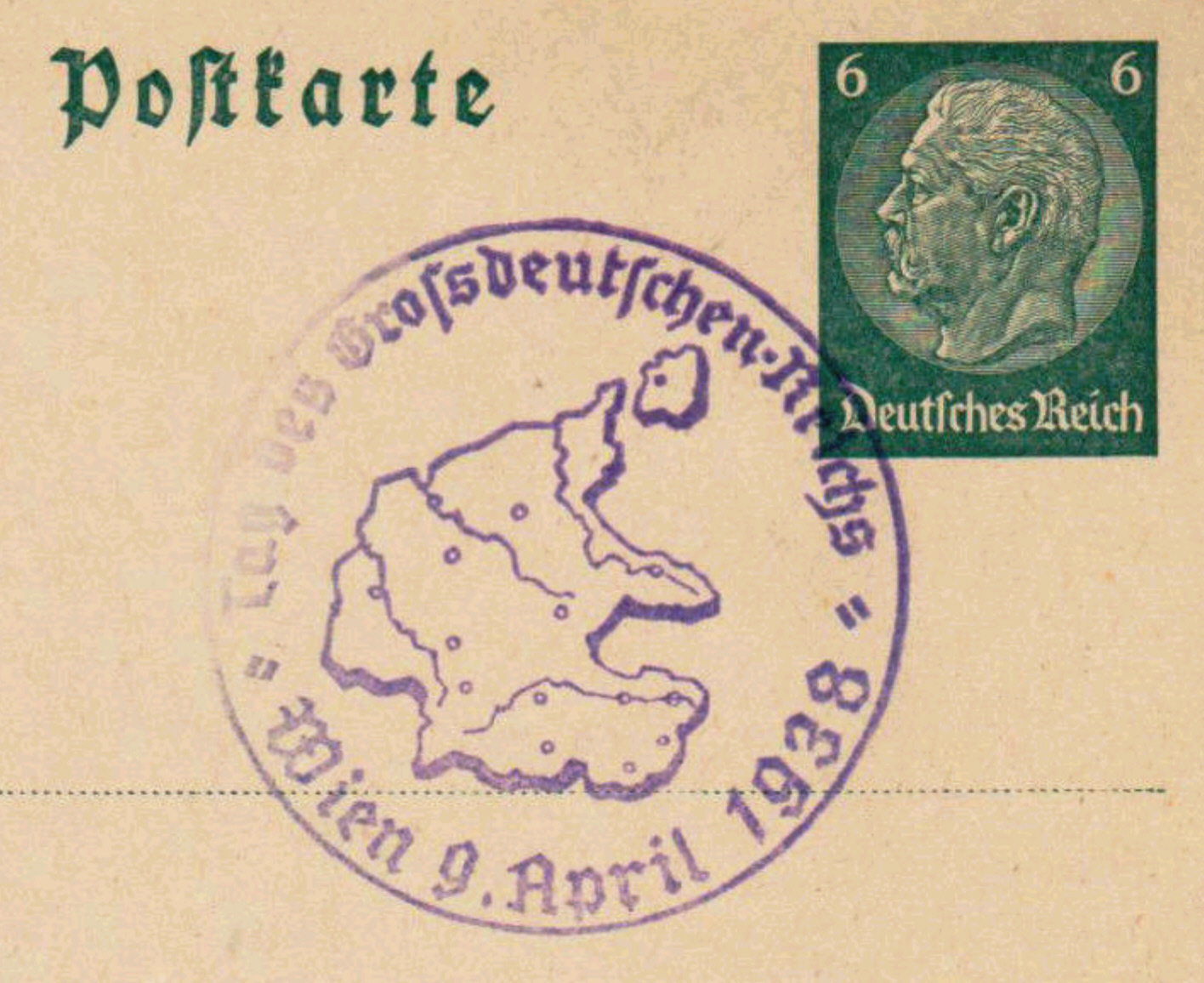 Sonderstempel auf einer Postkarte, Reichspost in Wien, "Tag des Großdeutschen Reichs"